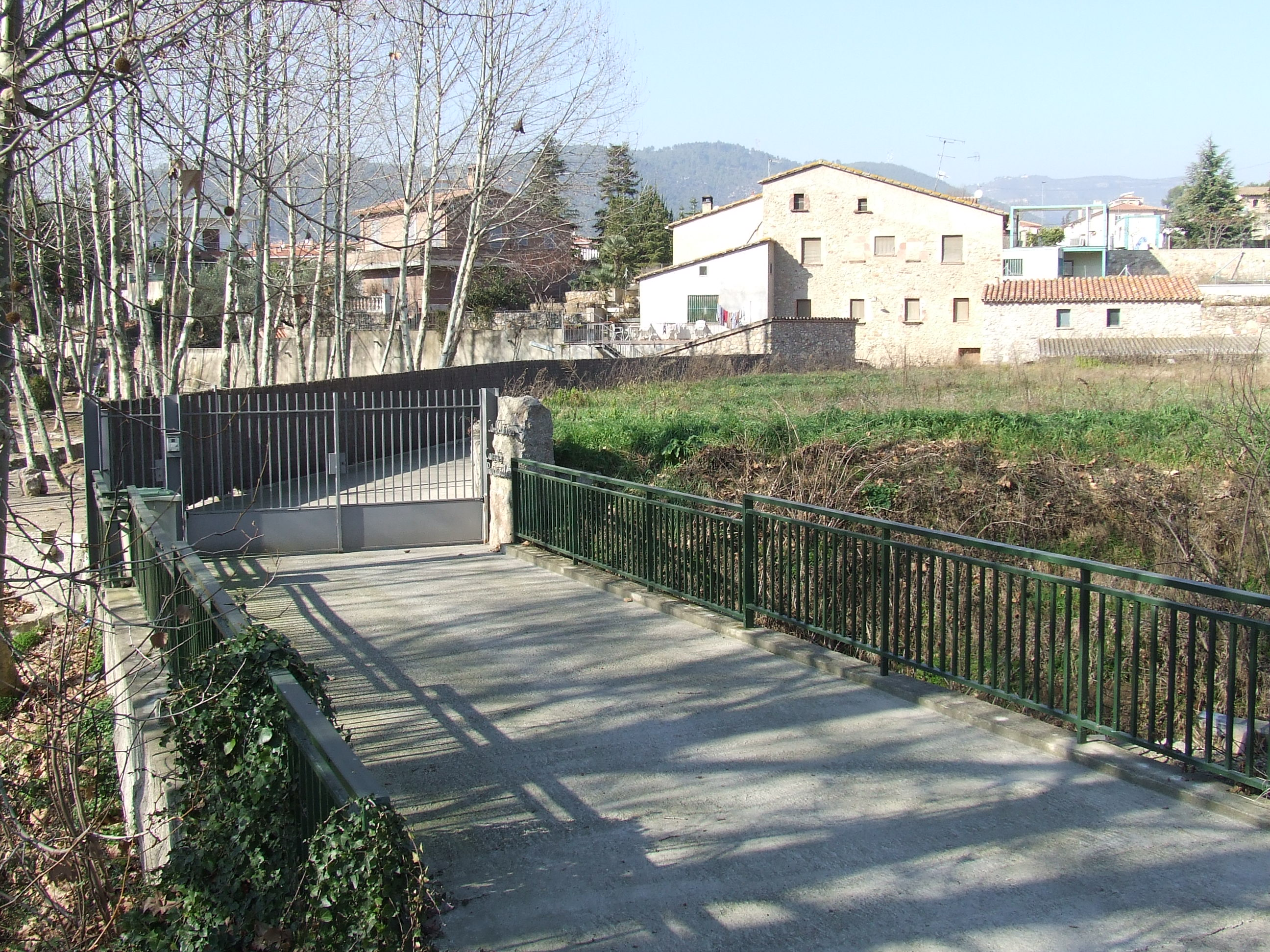 La masia i molí de Ca n'Ainé (Bigues, Bigues i Riells, Vallès Oriental).